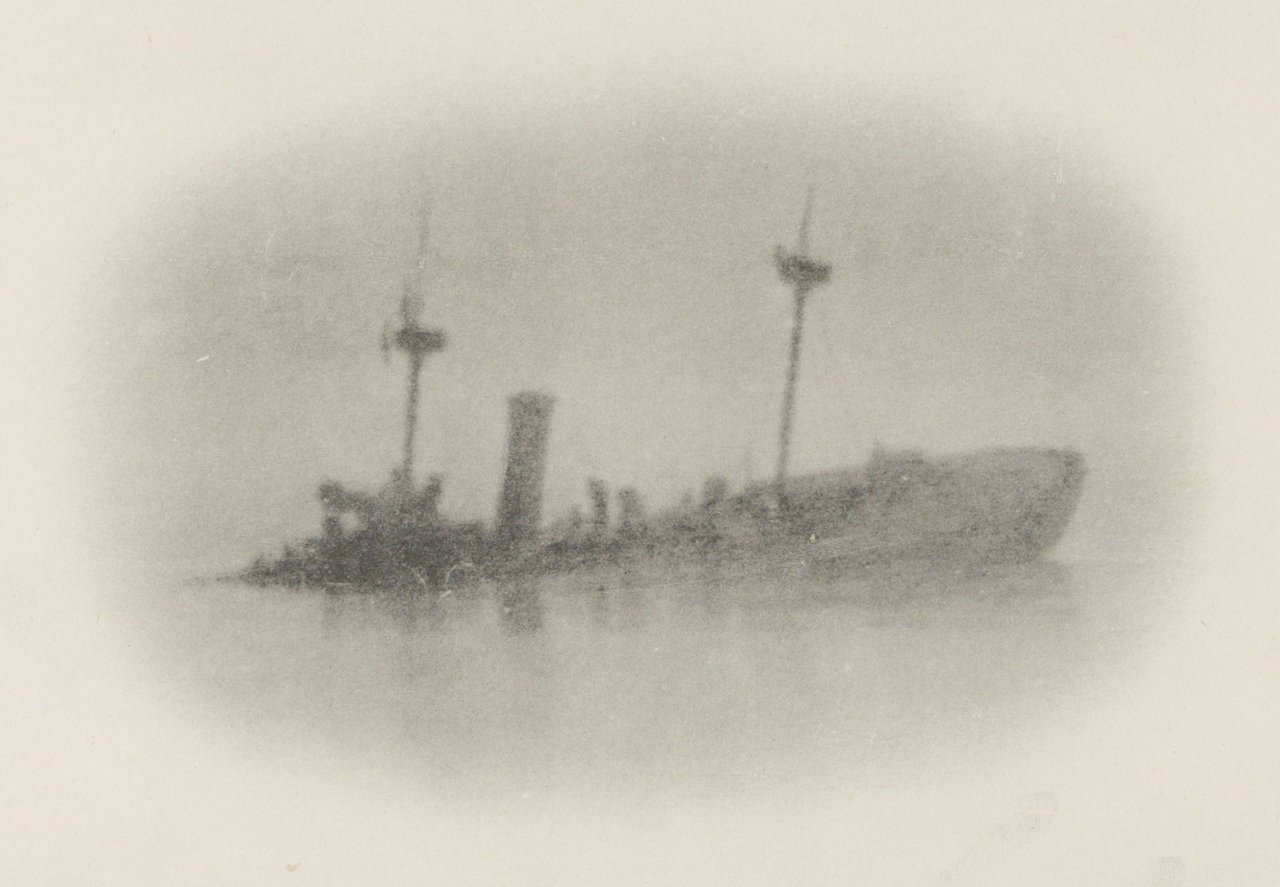 IdentificatieTitel(s): Zinken van het Chinese slagschip Jingyuen in de haven van WeihaiweiThe sinking of the Chinese man-of-war "Ching-Yuen" in Wei-Hai-Wei harbour (titel op object)Objecttype: fotomechanische afdruk bladzijde Objectnummer: RP-F-2001-7-1637B-15Opschriften / Merken: opschrift, recto, gedrukt: ‘Expedition to Wei-Hai-Wei.’opschrift, recto, gedrukt: ‘The sinking took place at 10.25 a.m., when the sky being overcast, a clear photograph could not be taken.’VervaardigingVervaardiger: fotograaf: Ordnance Survey Officeclichémaker: Kazumasa OgawaPlaats vervaardiging: fotograaf: Shandongclichémaker: JapanDatering: 9-feb-1895Materiaal: papier Techniek: lichtdrukAfmetingen: prent: h 195 mm × b 257 mmOnderwerpWat: sinking (movement in water)damage (to a ship)ships (in general)Verwerving en rechtenCredit line: Aankoop met steun van de Mondriaan Stichting, het Prins Bernhard Cultuurfonds, het VSBfonds, het Paul Huf Fonds/Rijksmuseum Fonds en het Egbert KunstfondsVerwerving: aankoop 2001Copyright: Publiek domein